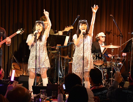 2019/11/4ラドンナ原宿で行われました公式ライブ